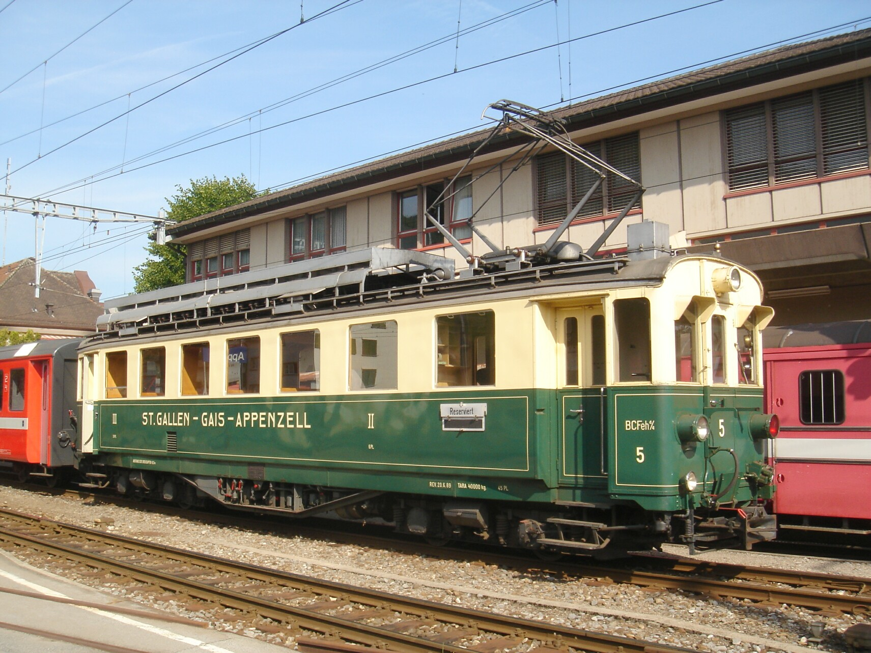 Appenzeller Bahnen: SGA BCFeh 4/4 5 (Serie 1-5) von 1931 hat einen frisch revidierten Wagen der Gossauer Linie nach Appenzell gebracht.